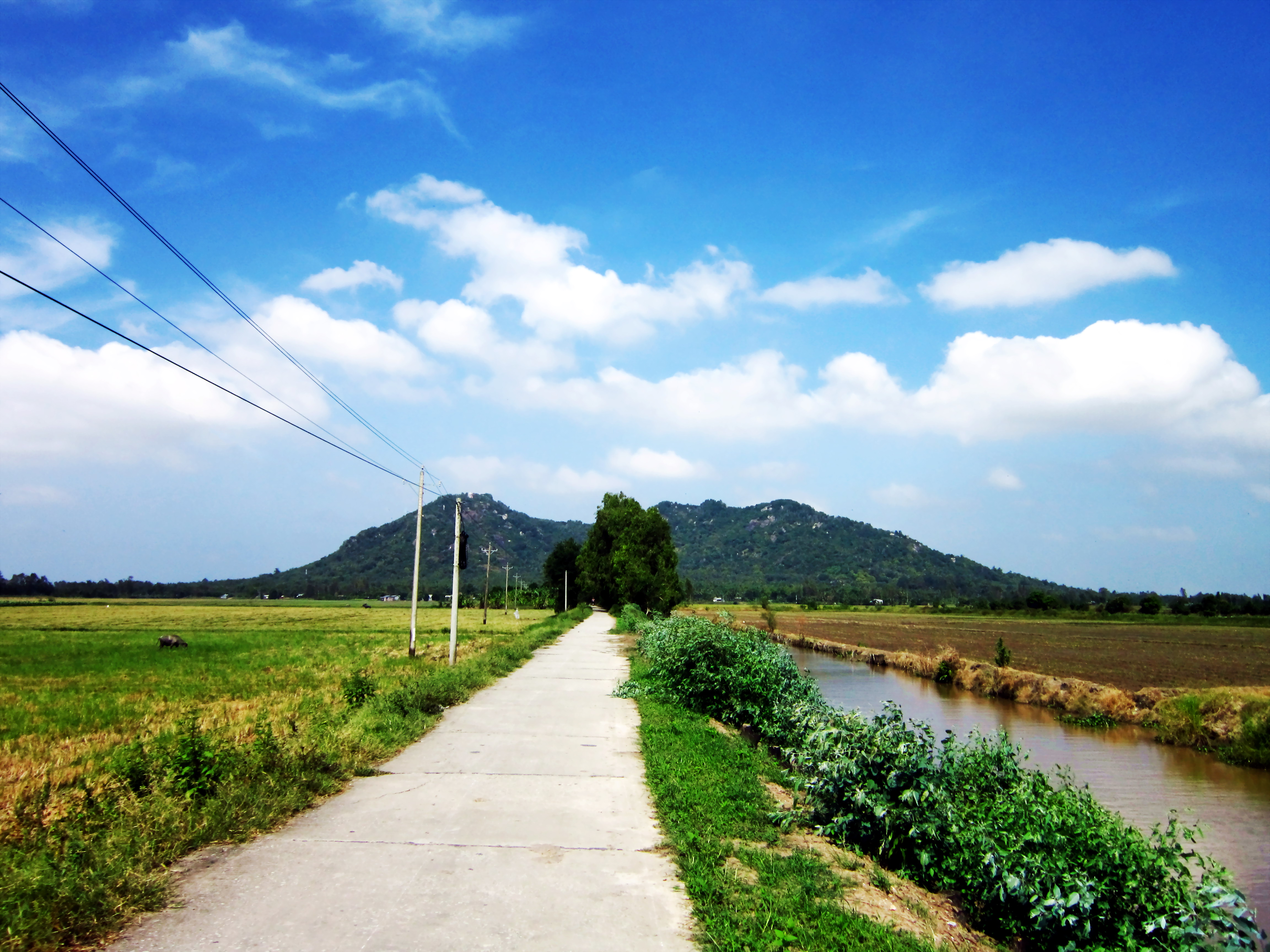 Trên đường Gò Cây Thị nhìn về núi Ba Thê thuộc Thoại Sơn, An Giang, Việt Nam)